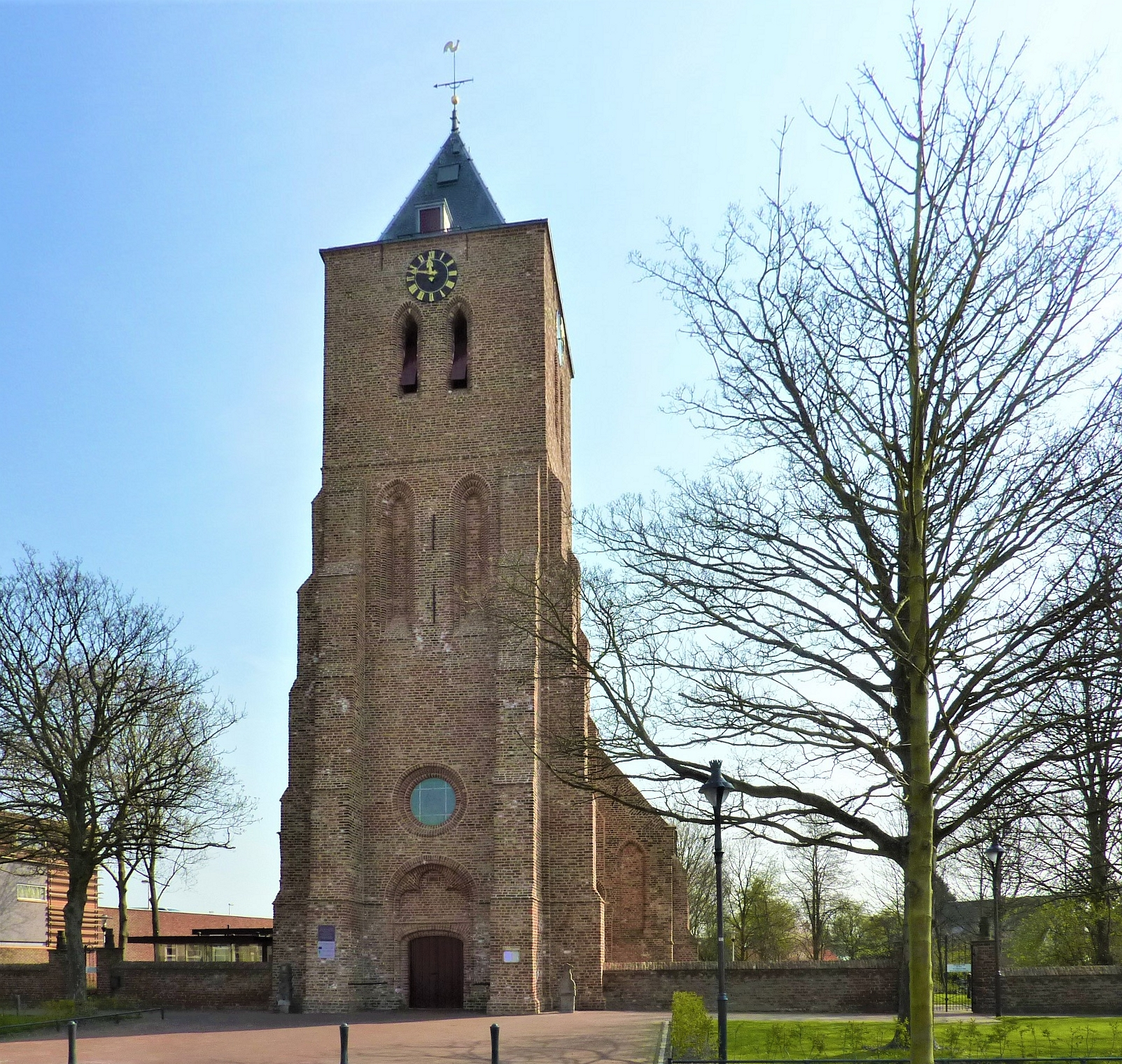 Kerk Open Haven (Oost-Souburg)